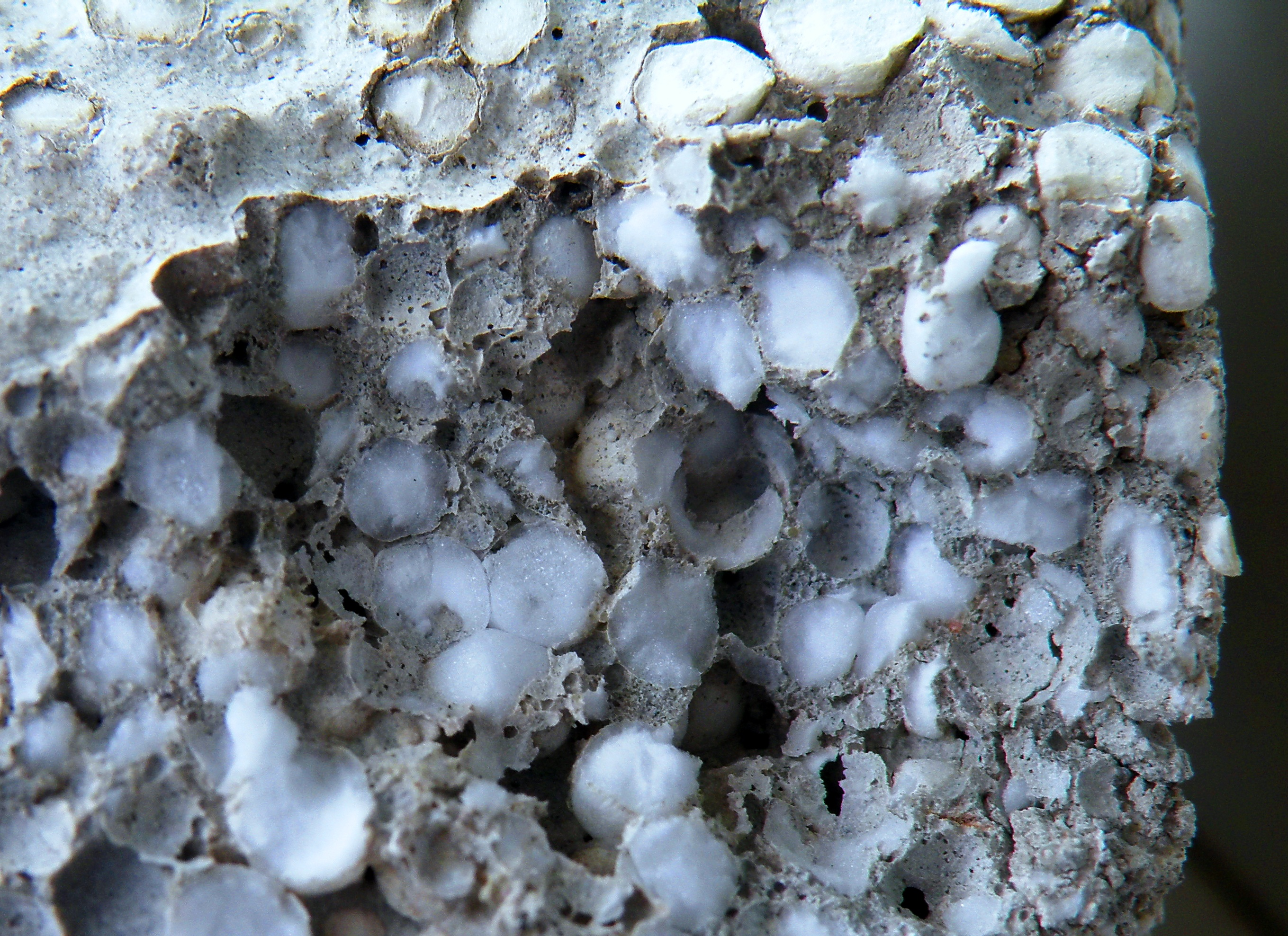 Полистиролбетон - легкий бетон с заполнителем из пенополистирола.